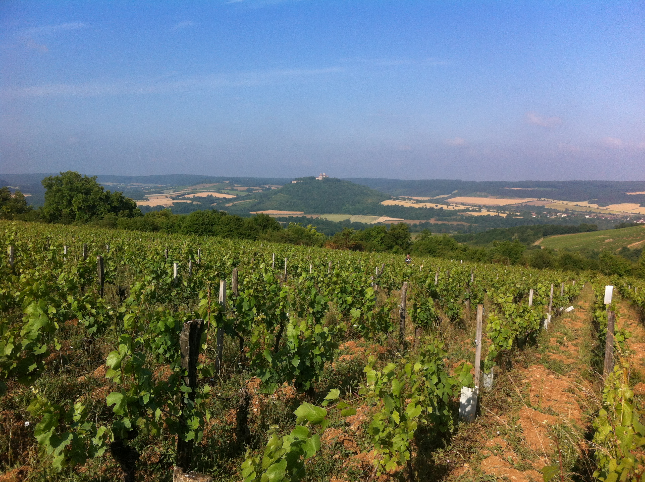 Vignes sur l'aire d'appellation Bourgogne Vézelay